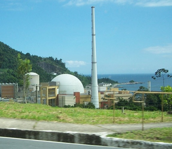 Aufnahme des Kernkraftwerk Angra (Brasilien) von der Küstenstrasse BR-101.